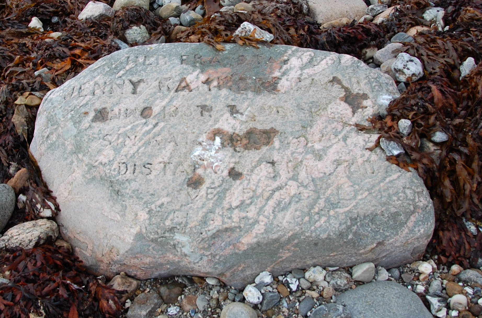 Gnibben Schwimmerstein von 1937